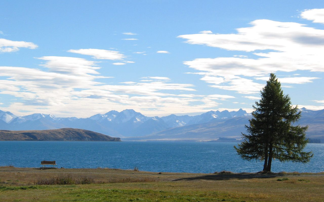 Lake Tekapo auf Neuseelands Südinsel, GNU FDL